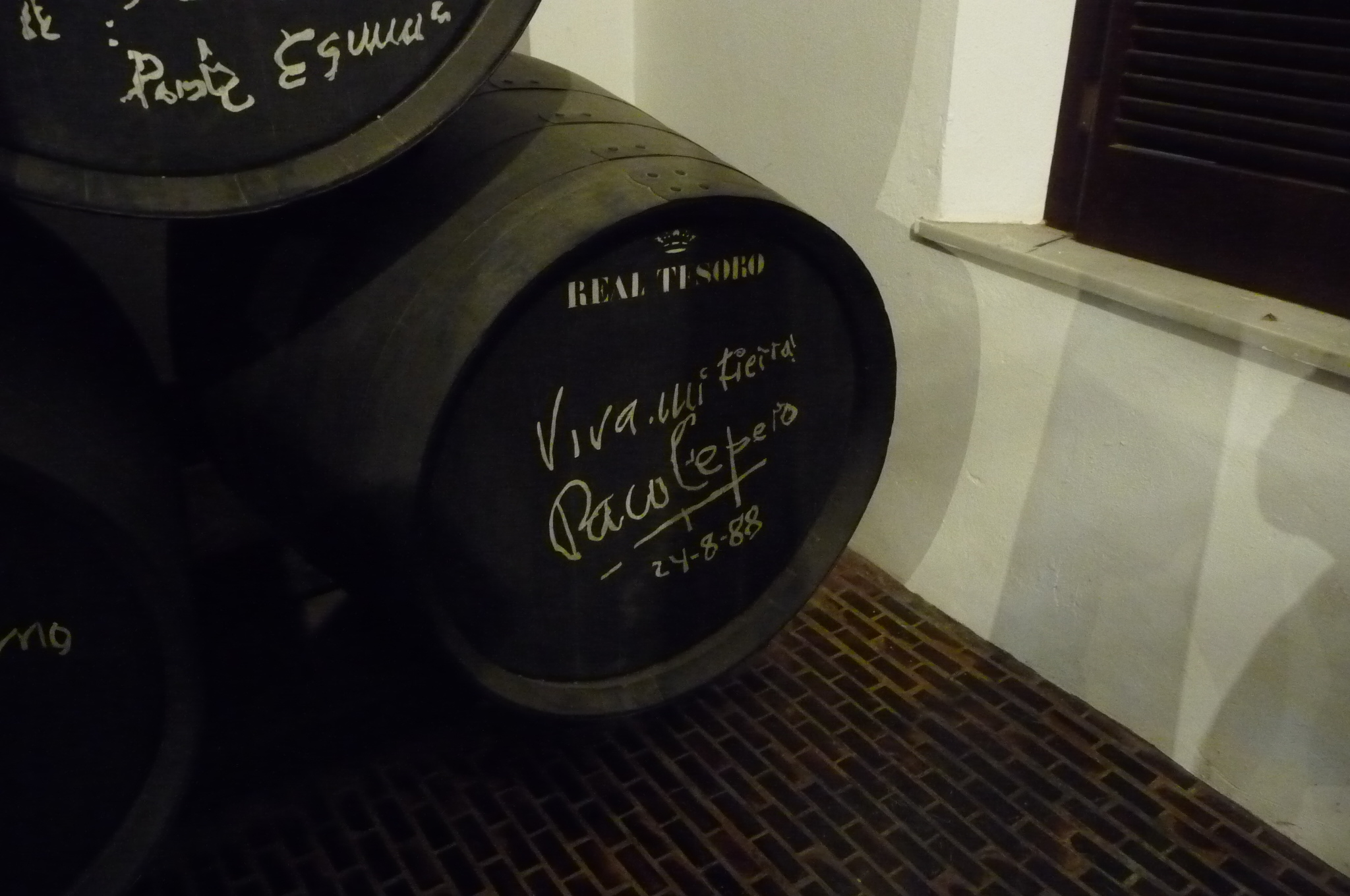 PacoCepero-p1000040.jpg